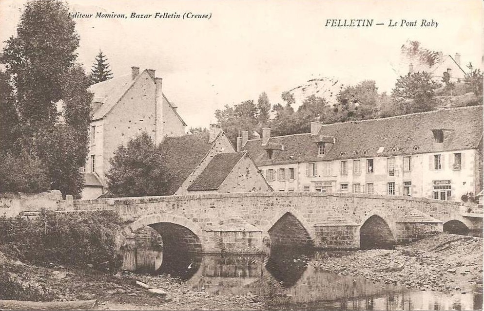 Le pont Raby